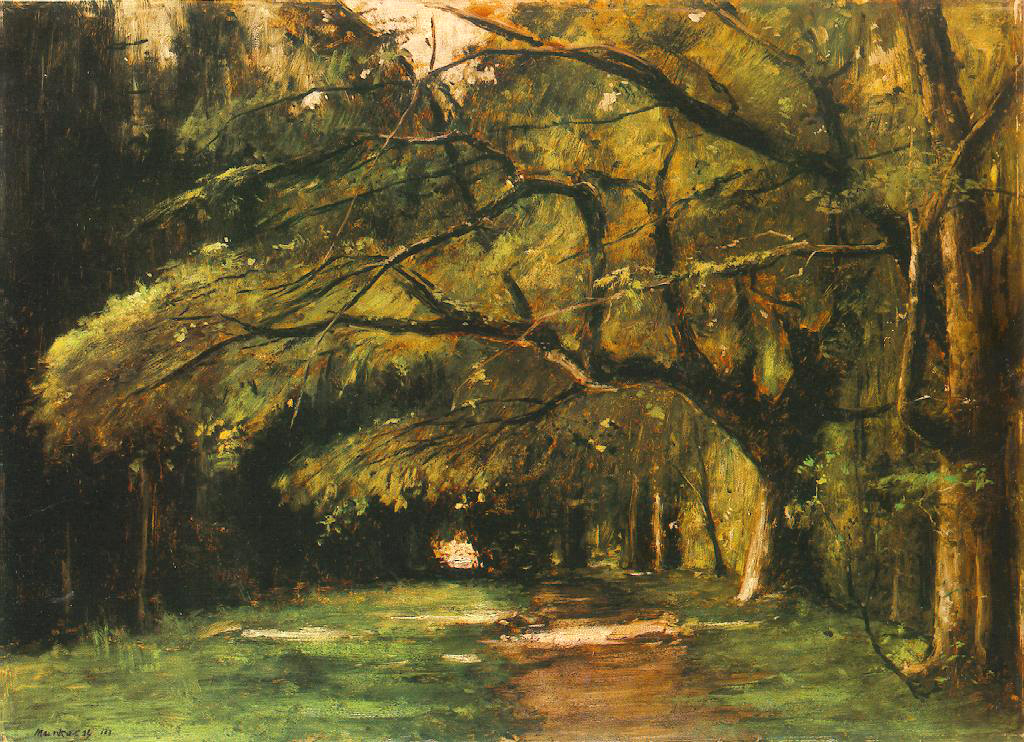 Mihály von Munkácsy: Park v Kolpechu